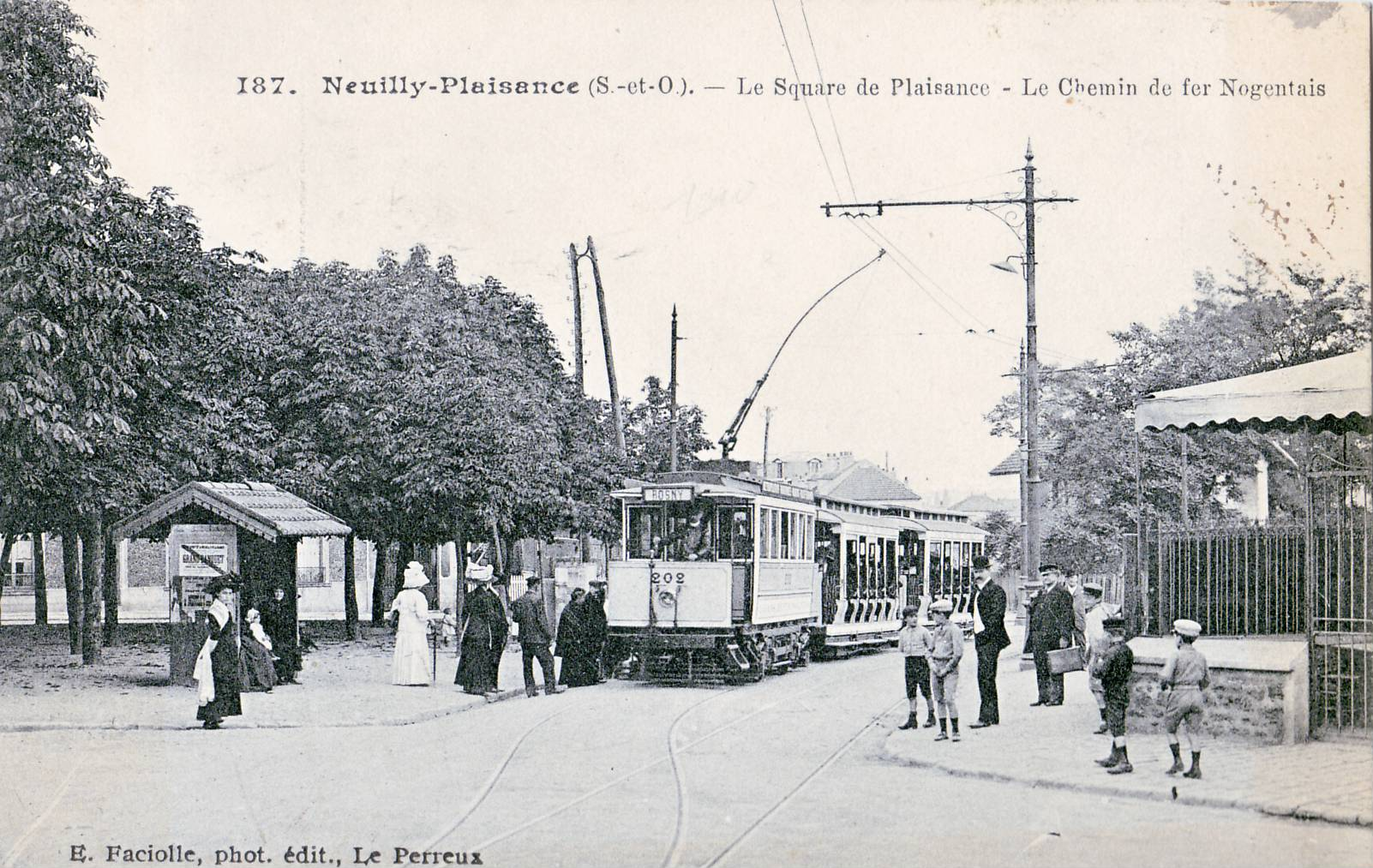 Carte postale ancienne éditée par Faciolle, N° 187 NEUILLY-PLAISANCE : Le square de Plaisance - Le Chemin de fer Nogentais Rame tractée par la motrice électrique 202 des Chemins de fer nogentais sur leur ligne N° 4